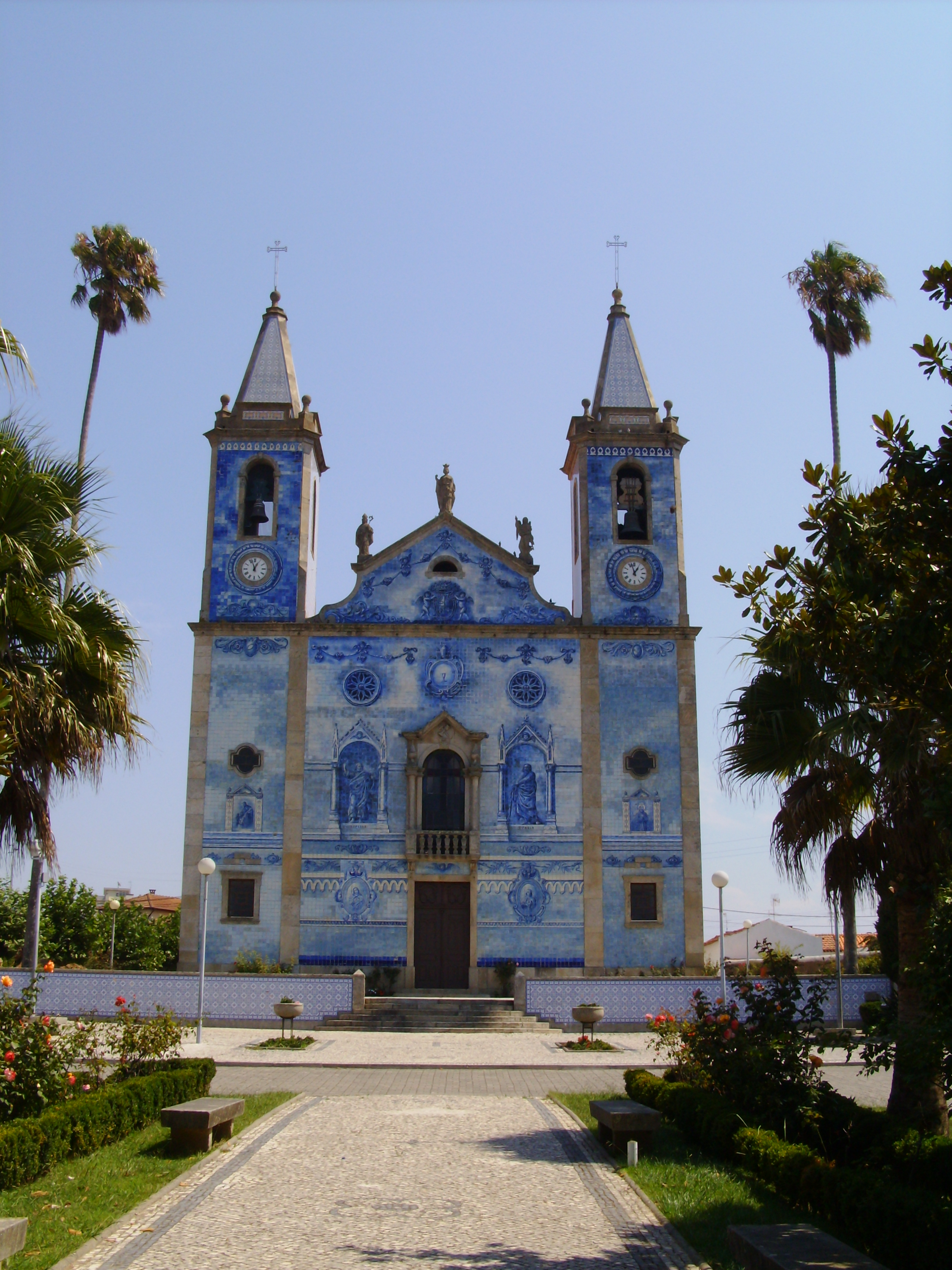 Igreja de Santa Marinha de Cortegaça, concelho de Ovar, distrito de Aveiro, Portugal.